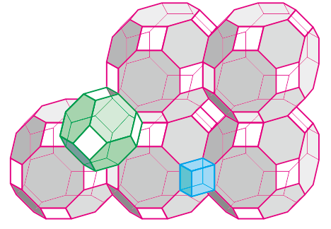 ペロブスカイト構造